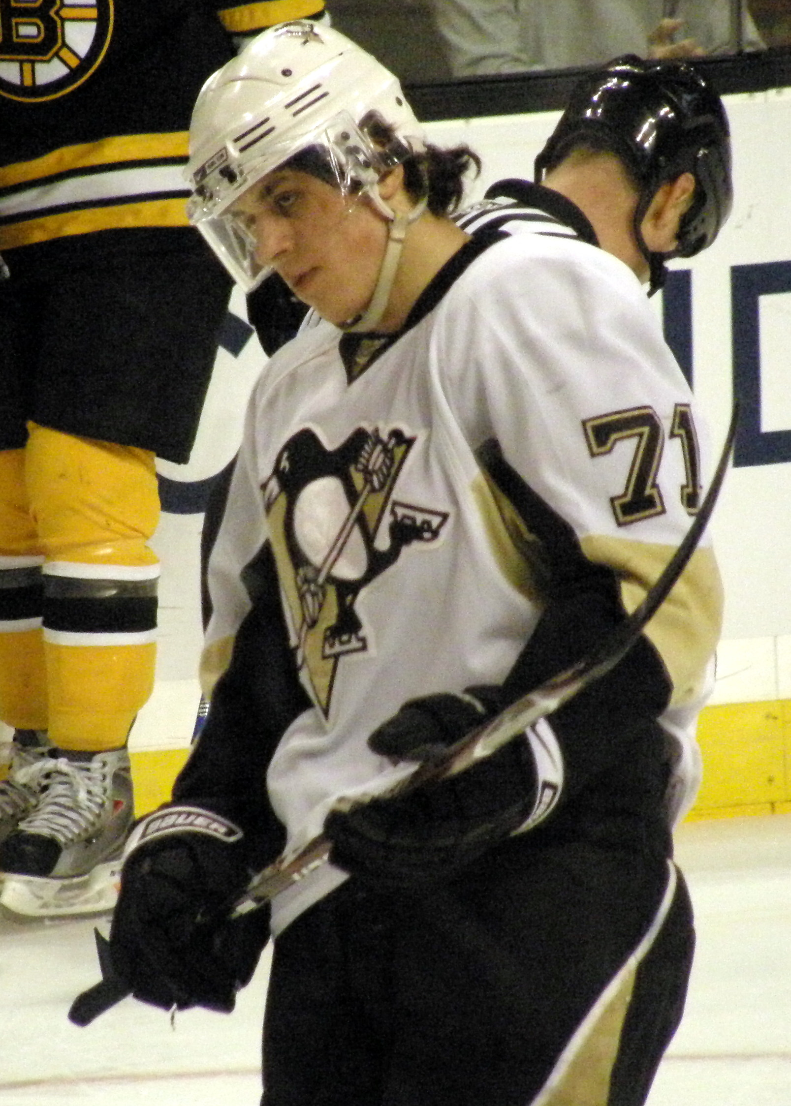 #71 Evgeni Malkin (C)